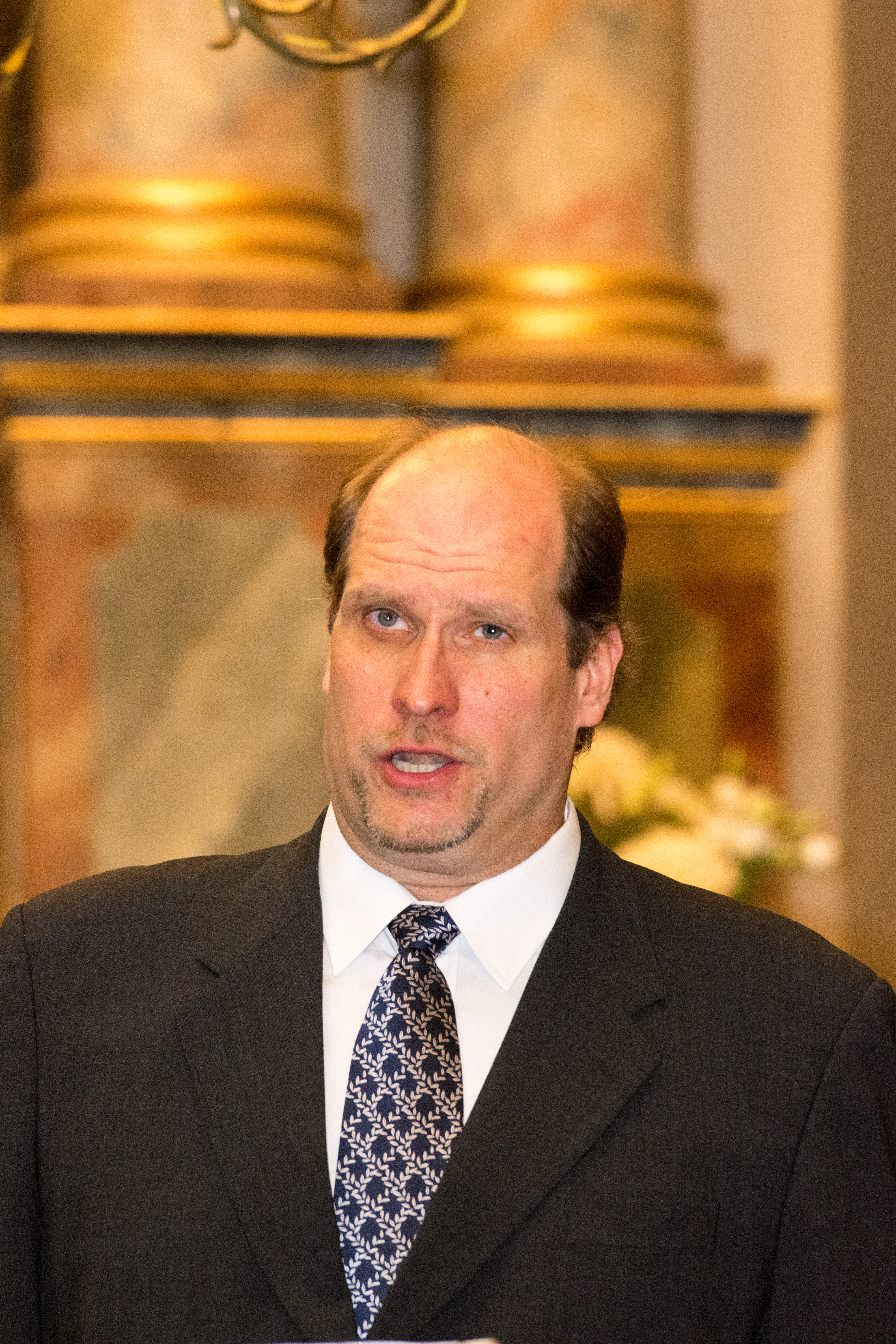 Mika Pohjonen suomalinen laulaja